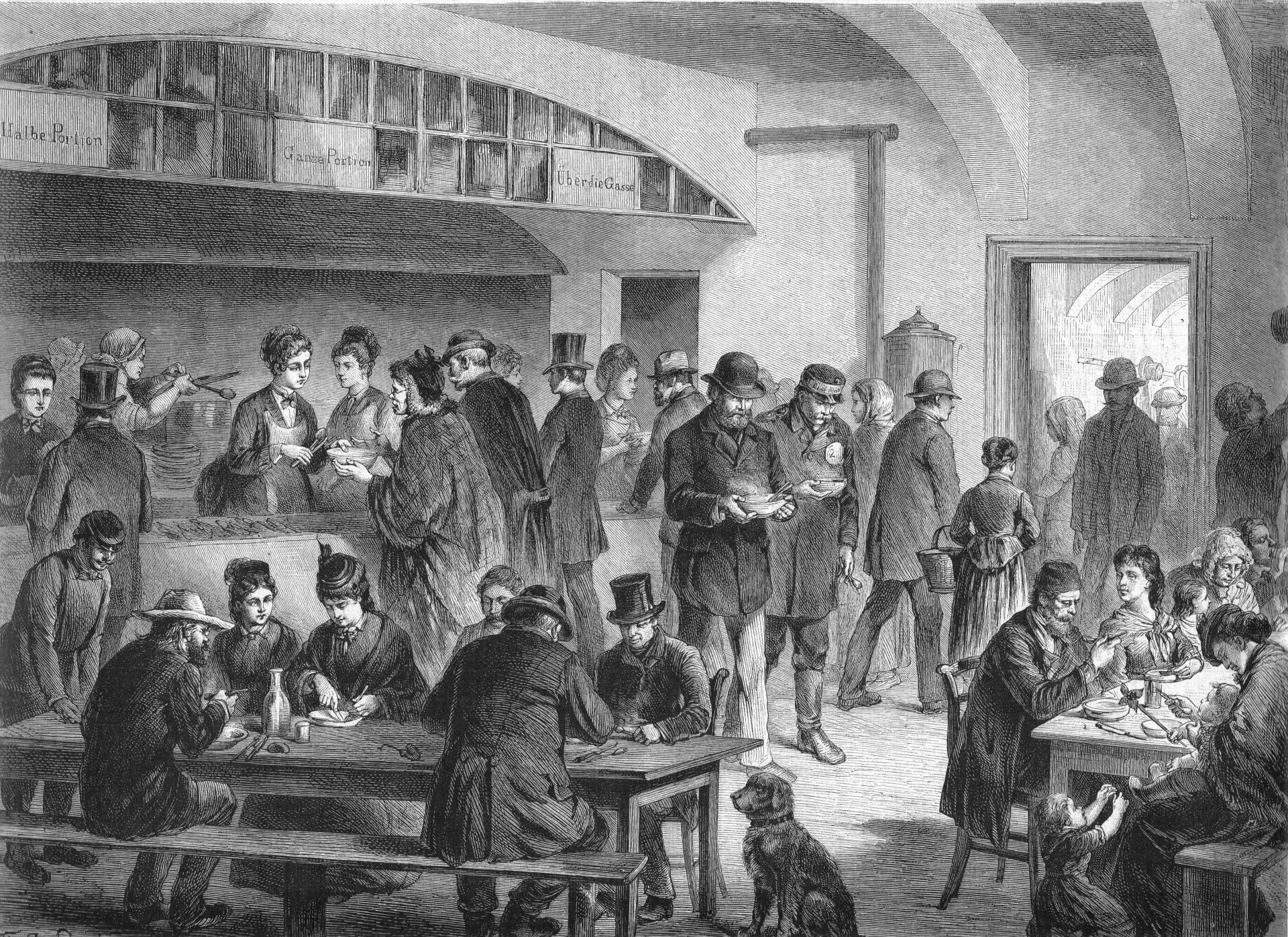 Eine Volksküche in Wien, Abbildung von Theodor Breitwieser (hier Schreibweise: Breidwiser) in der illustrierten Zeitschrift "Über Land und Meer" Jahrgang 1880